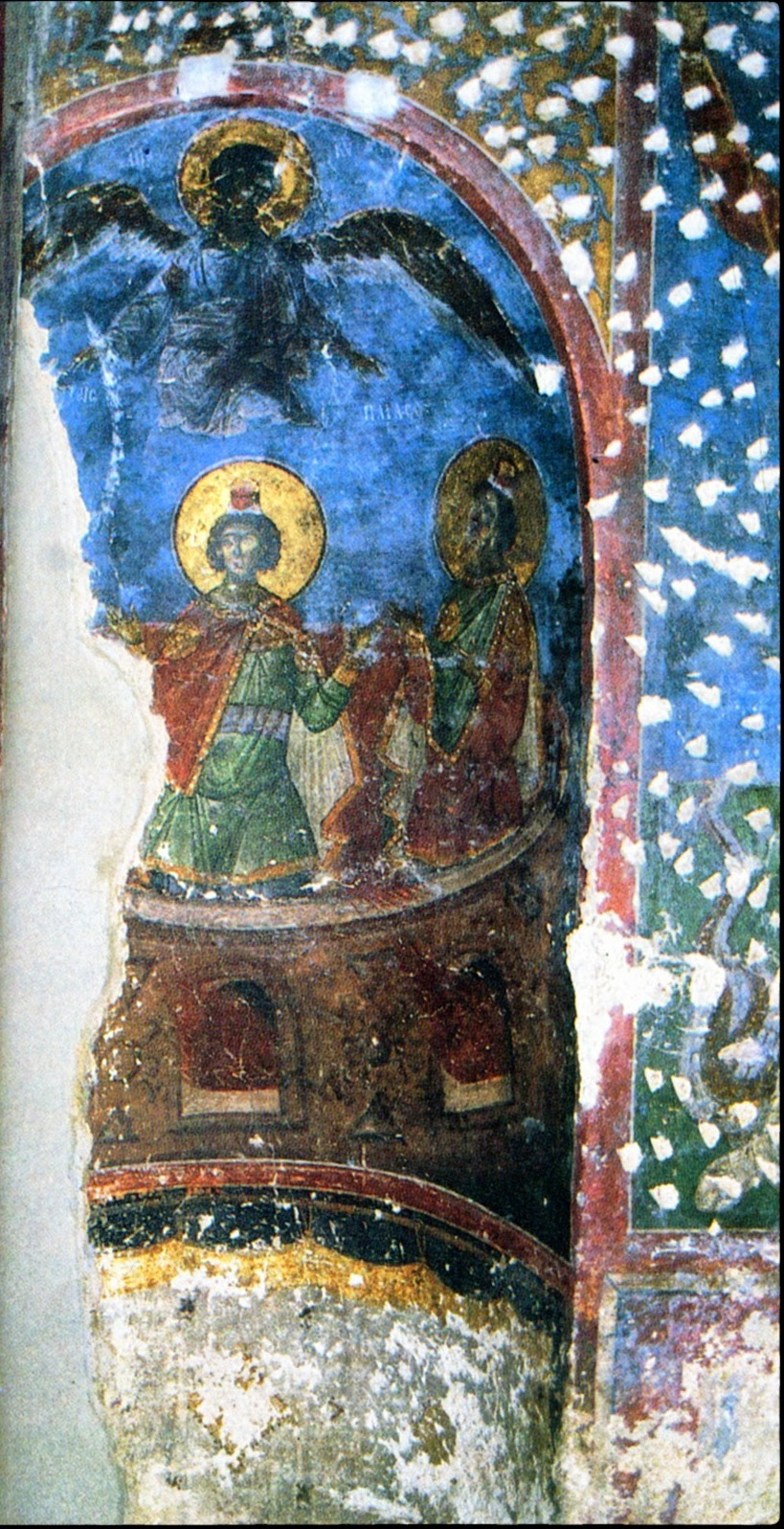 Θεσσαλονίκη, Μονή Βλατάδων. Οι τρεις παίδες εν καμίνω, 1360-1380